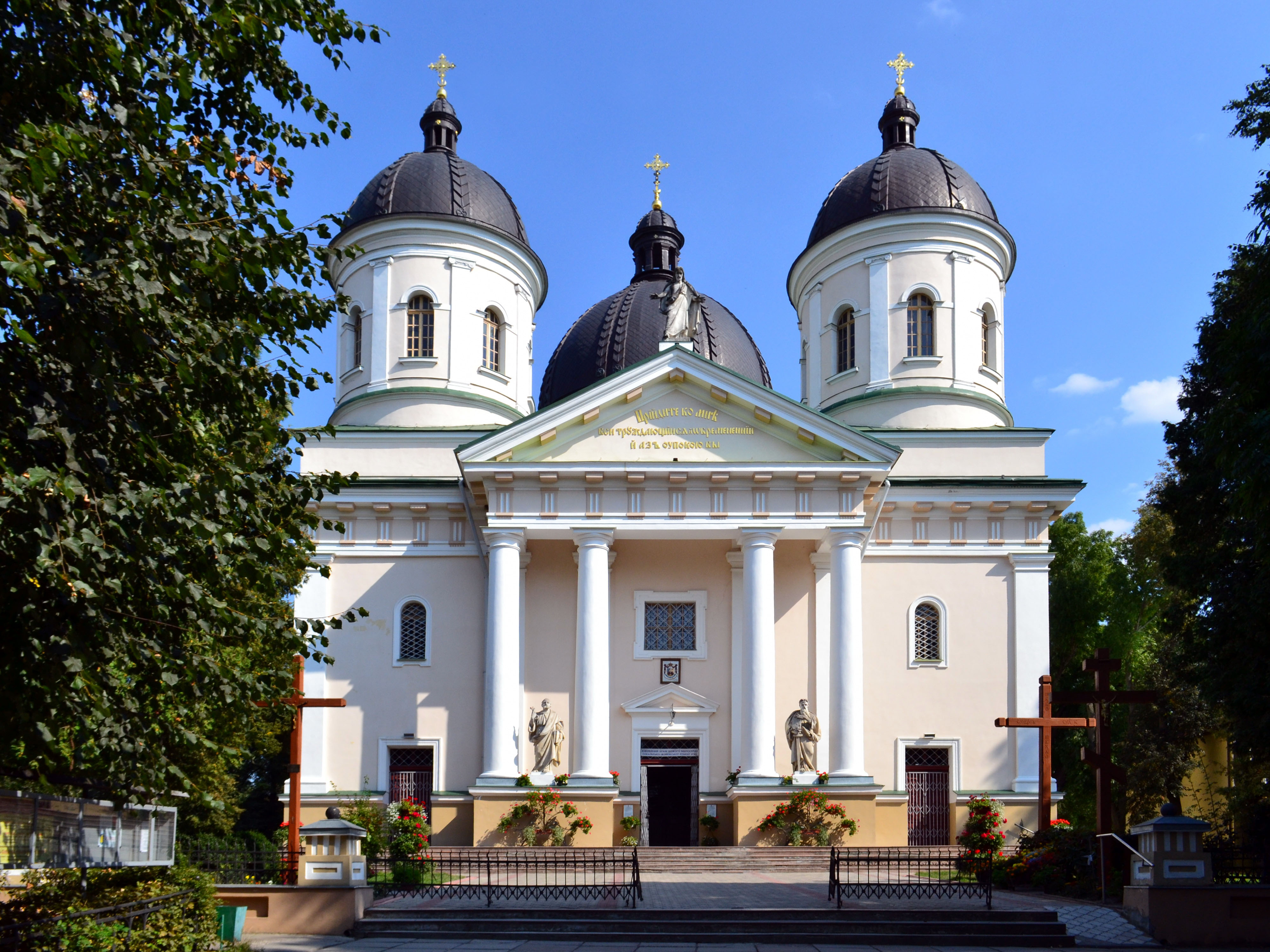 Церква Святих Петра і Павла (мур.) (1910 рік) - Сокаль (вул. Шептицького, 103) Львівська область Україна